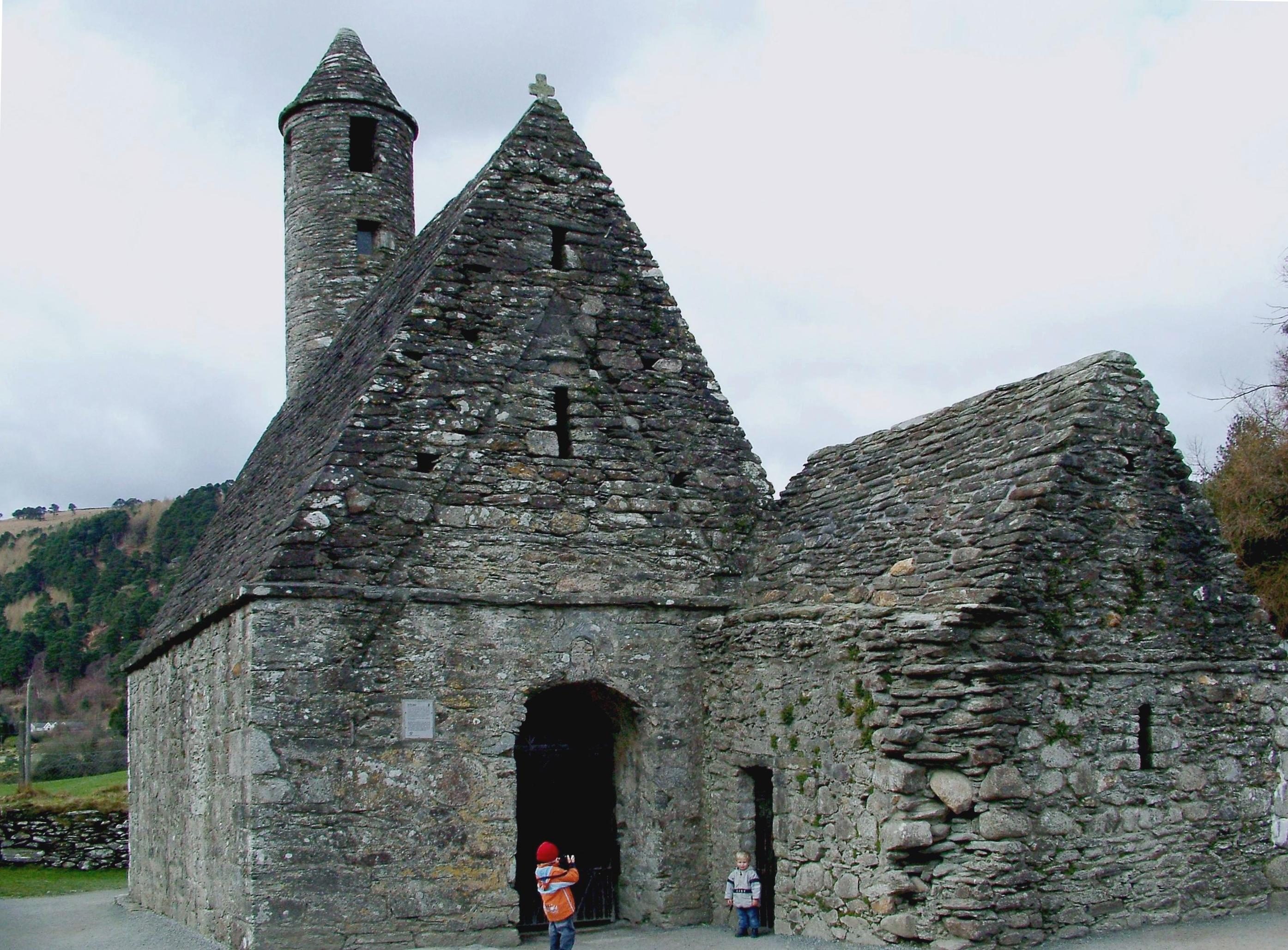 Glendalough: Szent Kevin konyhája nevű kolostortemplom (Írország)